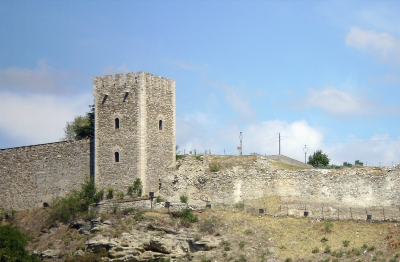 Kale Fortress in Skopje